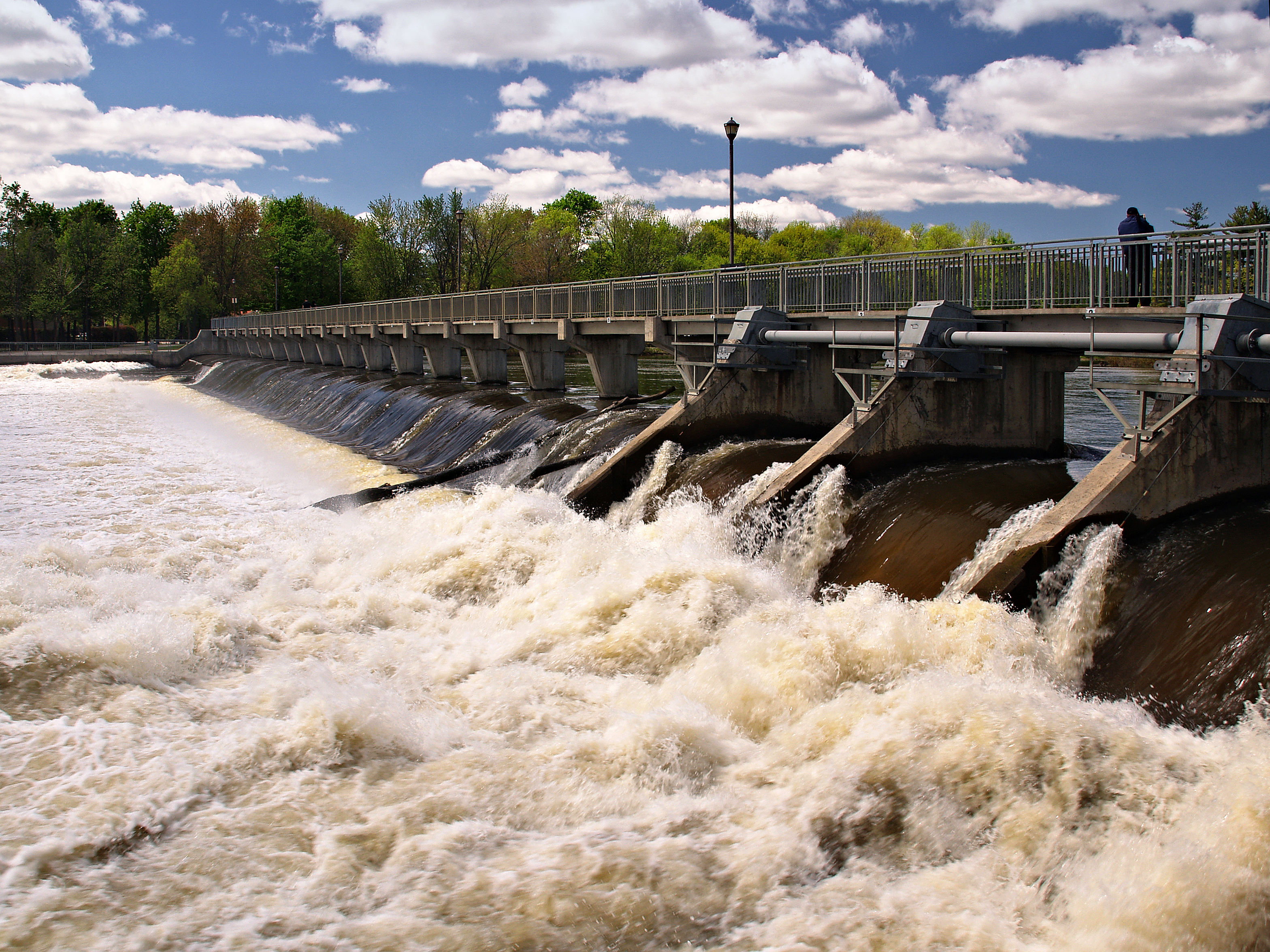 Terrebonne (Québec) - Barrage du Moulin-Neuf